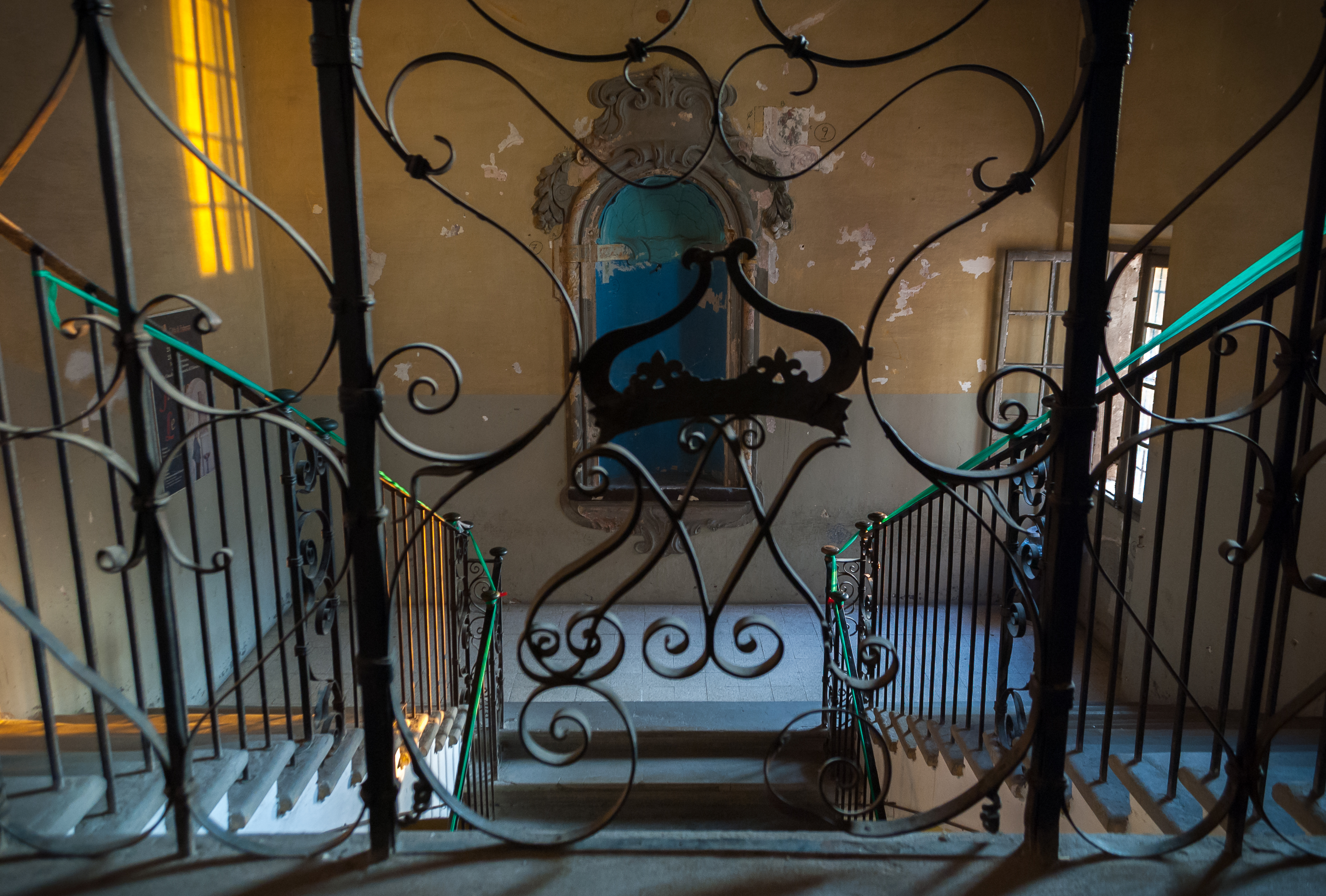 Palazzo delle Orsoline This is a photo of a monument which is part of cultural heritage of Italy.